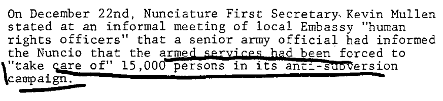 Informe del encargado de derechos humanos de la Embajada de Estados Unidos en Argentina Allen Harris, 27 de diciembre de 1978. Fuente: Archive